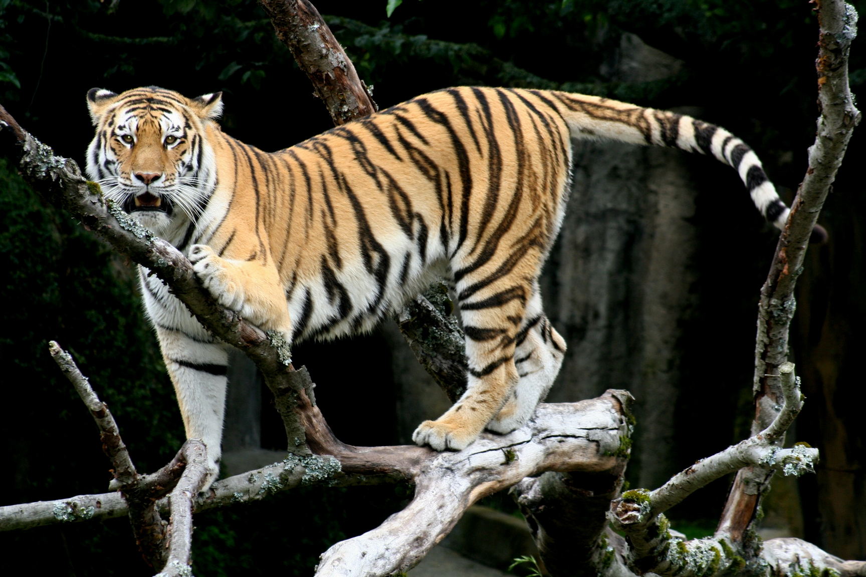 Tiger